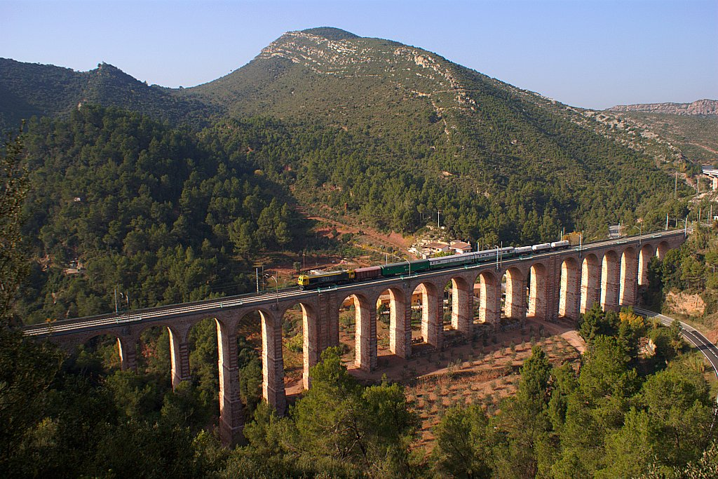 Abans de que passés el tren de la fusta Manresa - València-FSL va baixar l'herbicida, però abans se'm van escapar el balaster de baixada i el fustes de pujada, si hagués sortit tot hagués estat un dia rodó. Pel que es refereix a la foto, la 319.223 baixant amb l'herbicida cap a Montcada, al seu pas pel pont d'Olesa de Montserrat. Una salutació pel maquinista, en Caballero.